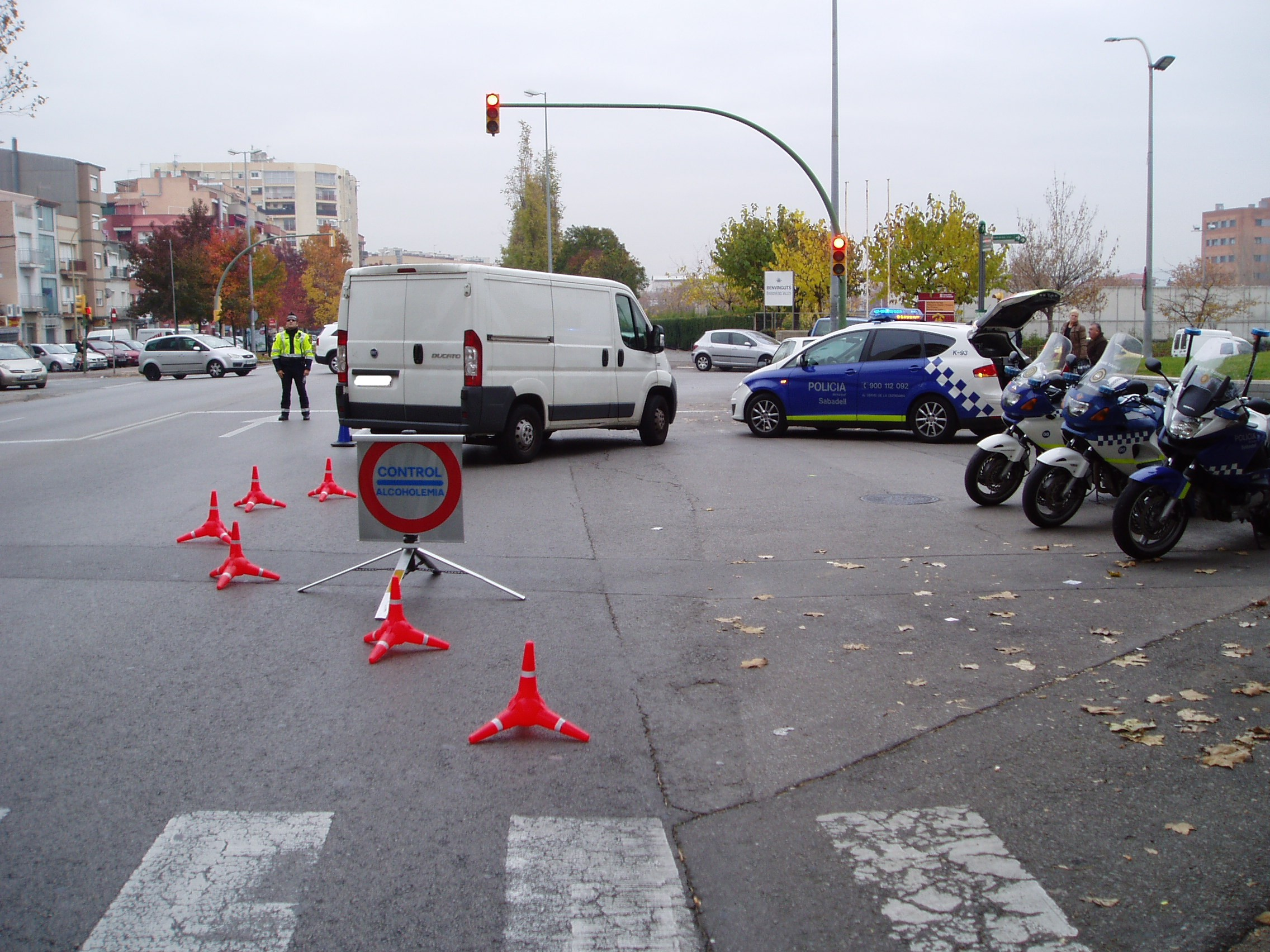 Control d'alcoholemia i consum de drogues que porta a terme la Policia Municipal de Sabadell en coordinacio amb el Servei Catala del Transit